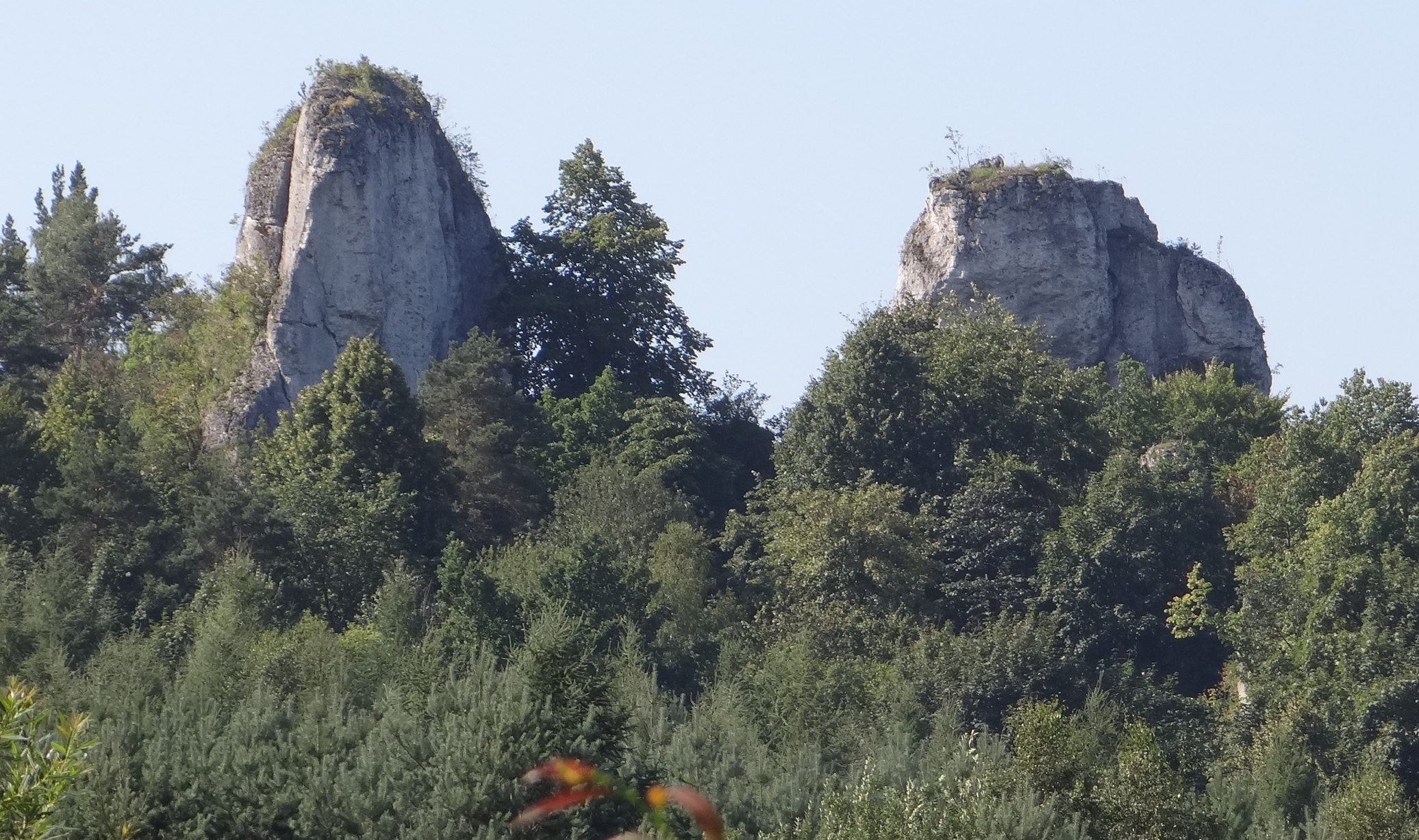 Zegarowe Skały: Zegarowa i Mała Zegarowa